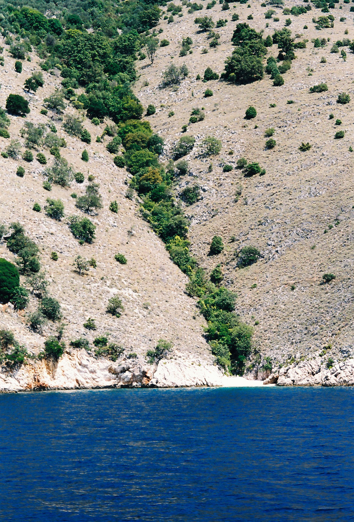 Srpskohrvatski / српскохрватски: Divlja obala Cresa (15.07.2008.)